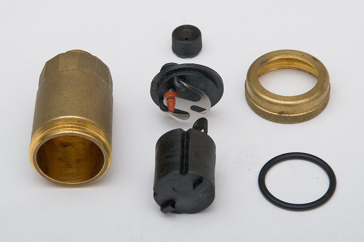 In Einzelteile zerlegtes selbsttätiges Entlüftungsventil.